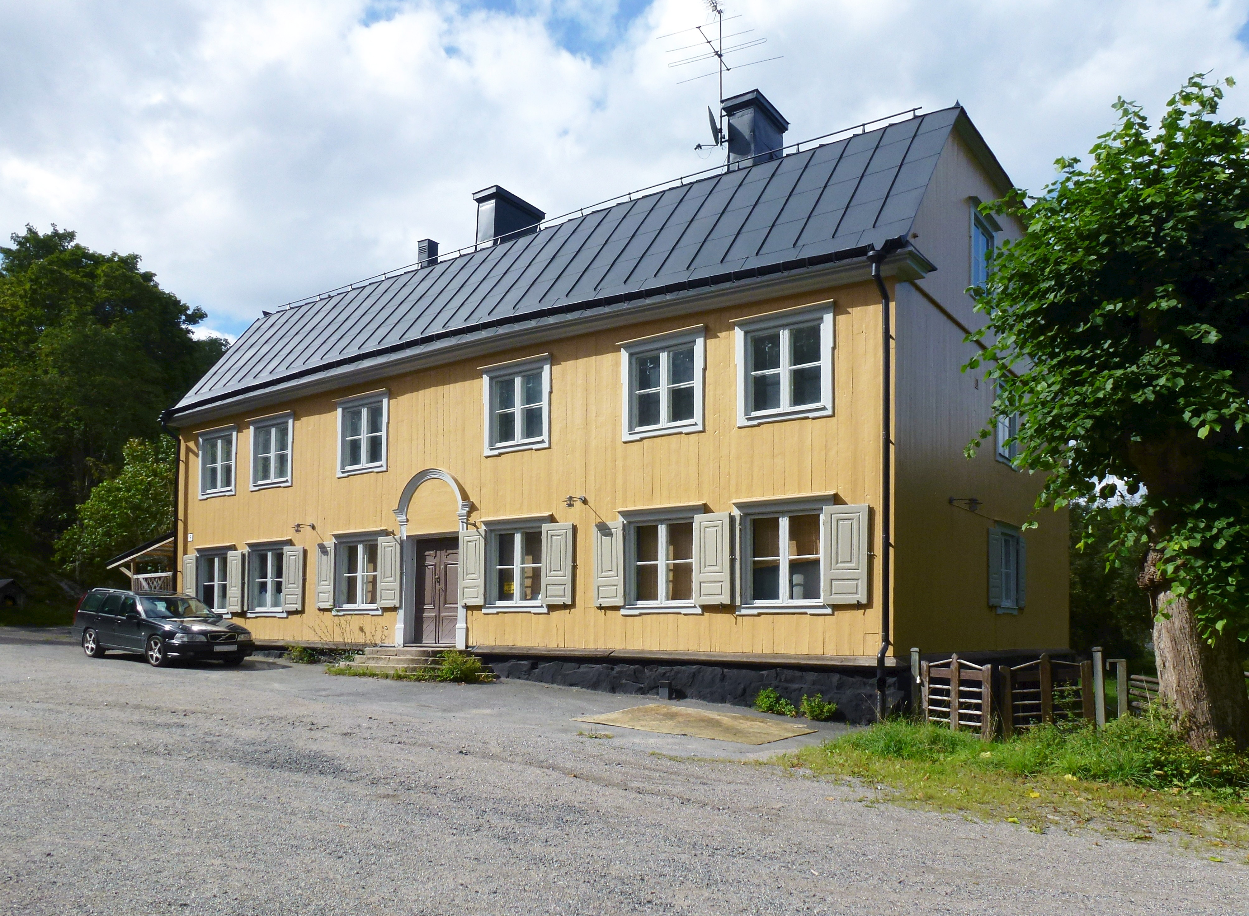 Lilla Sickla, huvudbyggnad